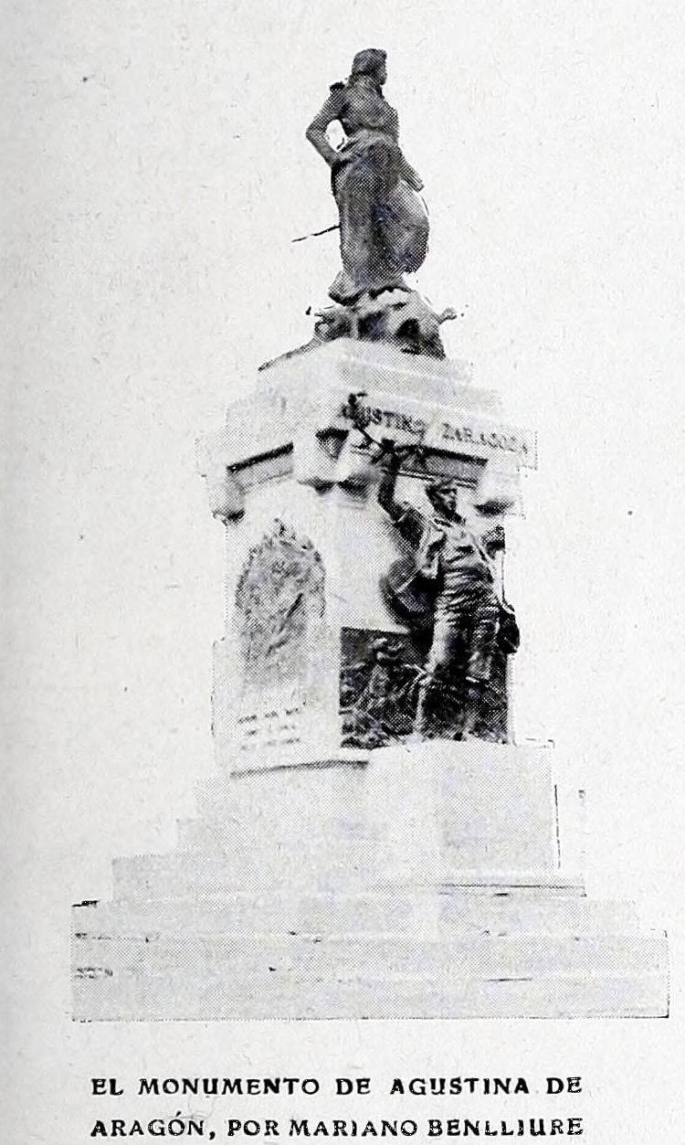 Crónica Gráfica. Los monumentos de Zaragoza, de Querol y Benlliure.